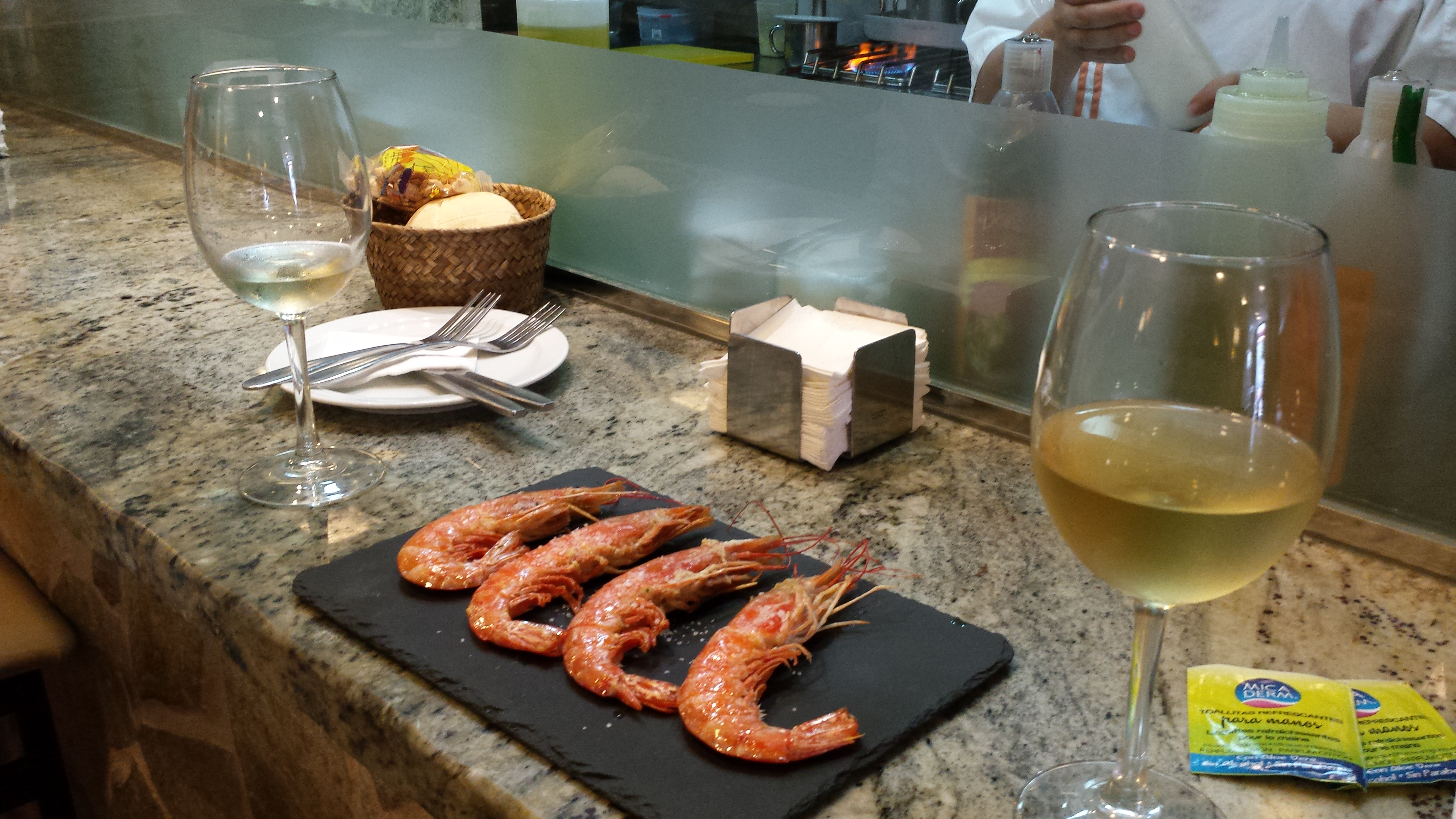 Tapa de gambones y vino blanco.